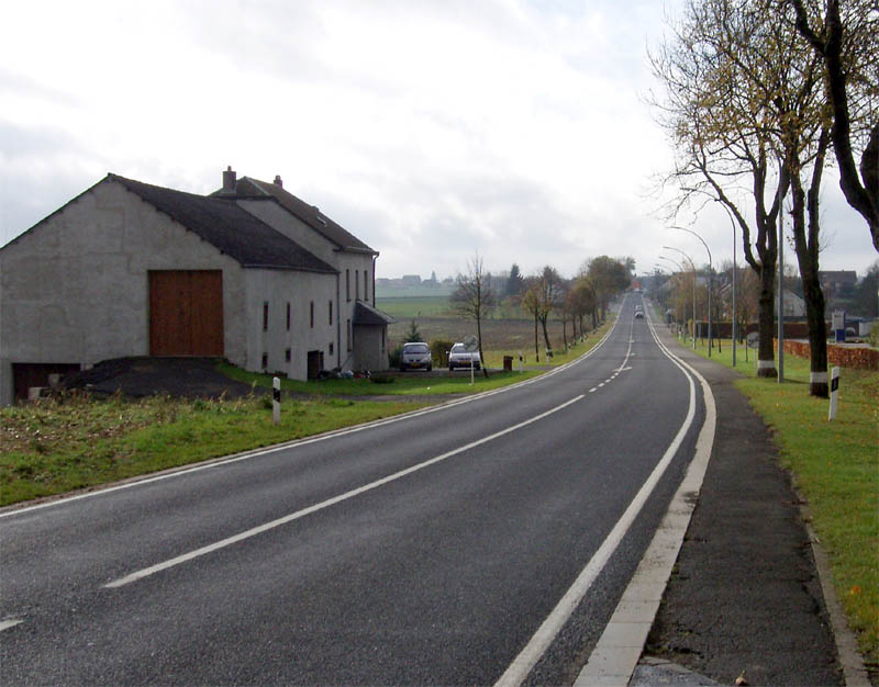 Fëschbech bäi Hengescht - am Hannergrond (do wou en Auto fiert) gesäit een déi éischt Haiser vu Maarnech.